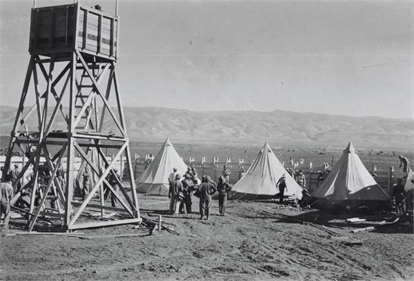 נוה איתן - מאהל